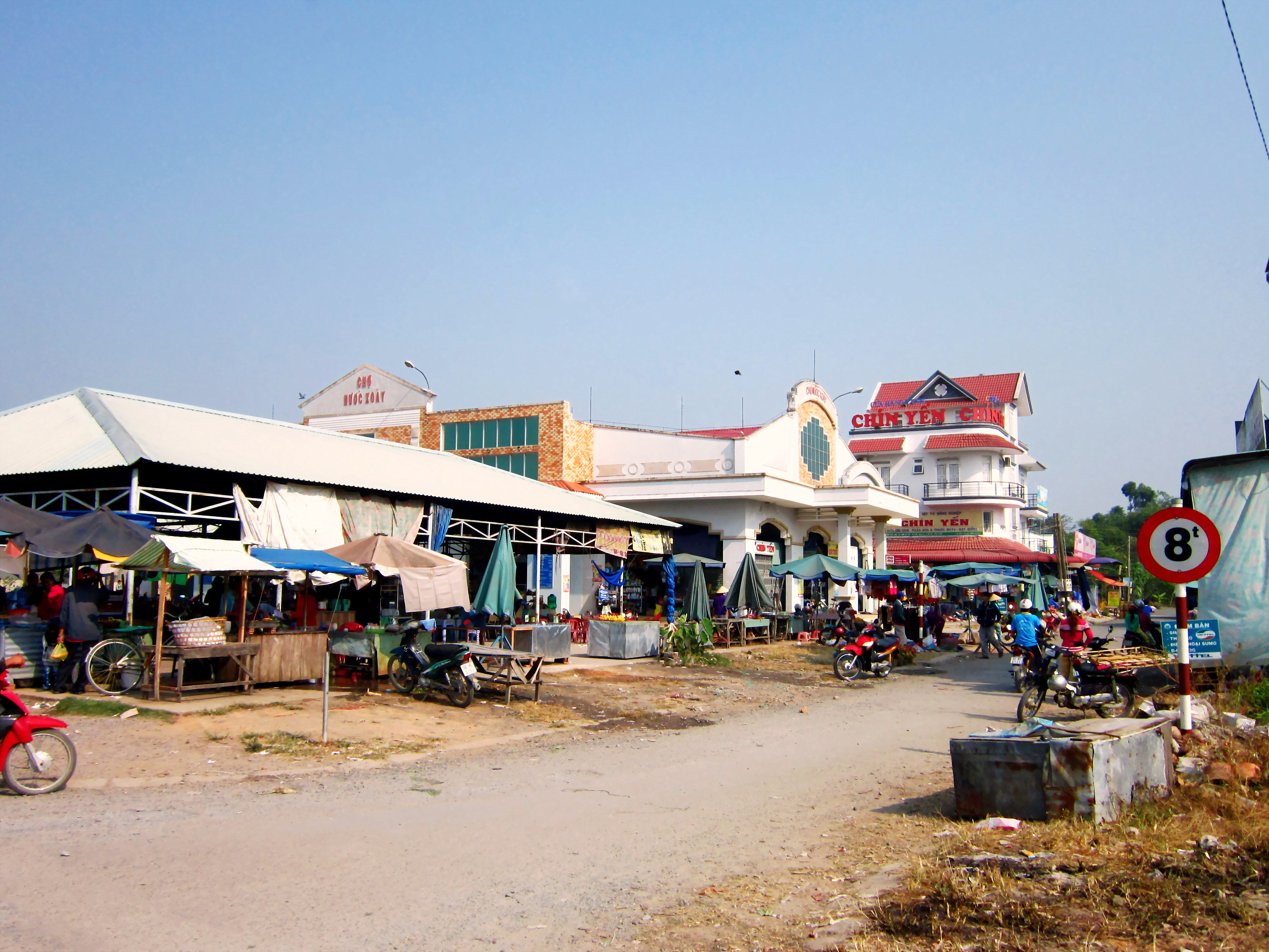 Chợ Nước Xoáy (khu mới) ở xã Long Hưng A, huyện Lấp Vò, Đồng Tháp, Việt Nam.